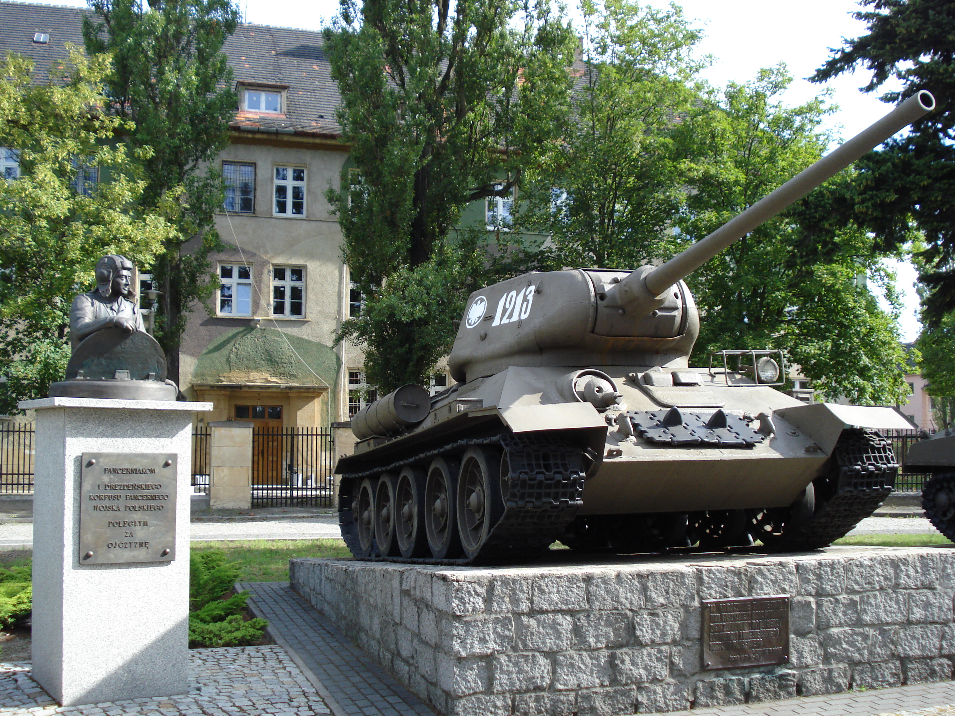 Po lewej pomnik "Pancerniakom 1 Drezdeńskiego Korpusu Pancernego Wojska Polskiego poległym za Ojczyznę", po prawej czołg T-34-85. W tle budynek koszarowy, w którym mieściło się dowództwo 89 (99) Pułku Zmechanizowanego, a w którym będzie się mieścić Muzeum Wojsk Pancernych.